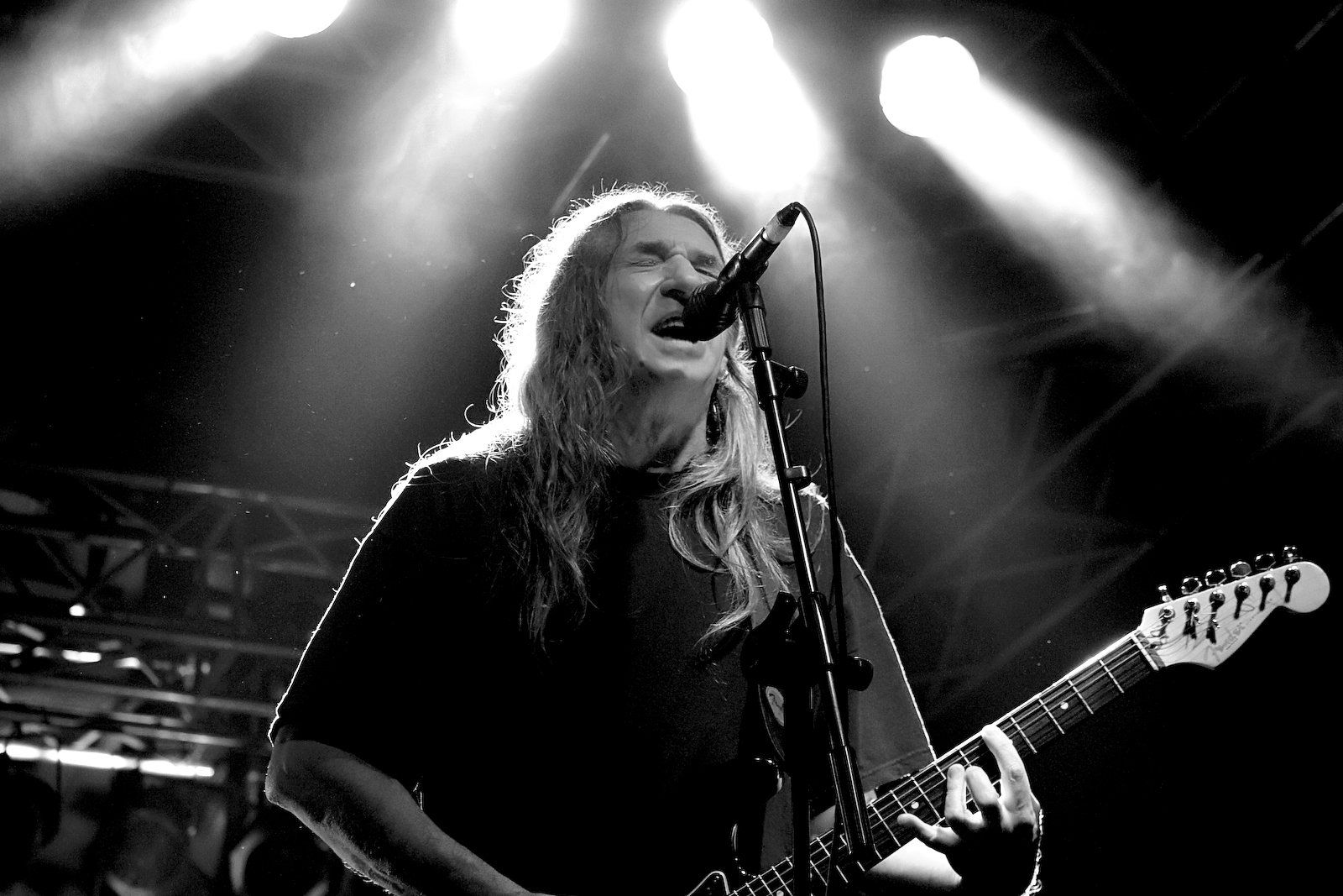 Rosendo